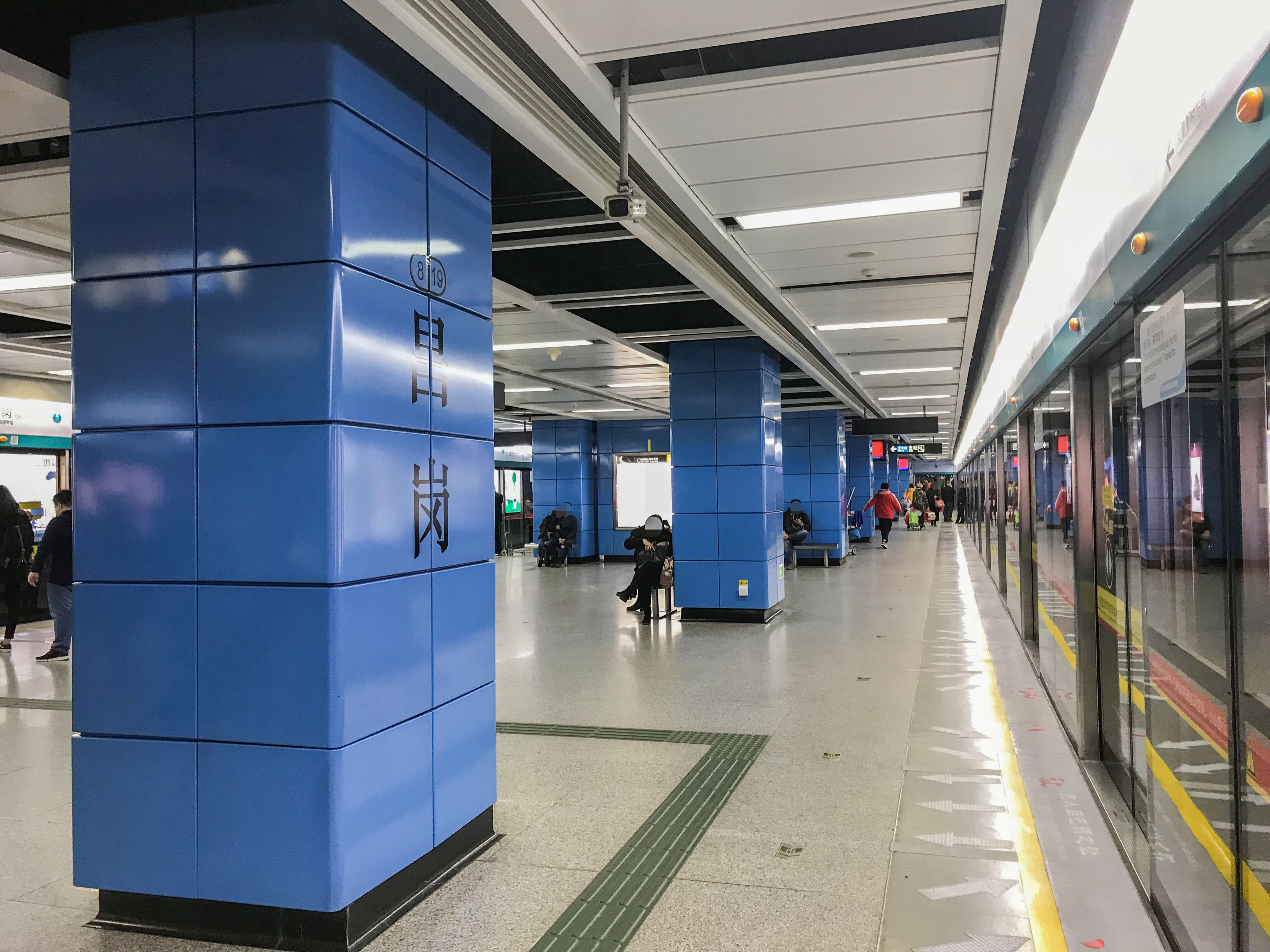 广州地铁昌岗站